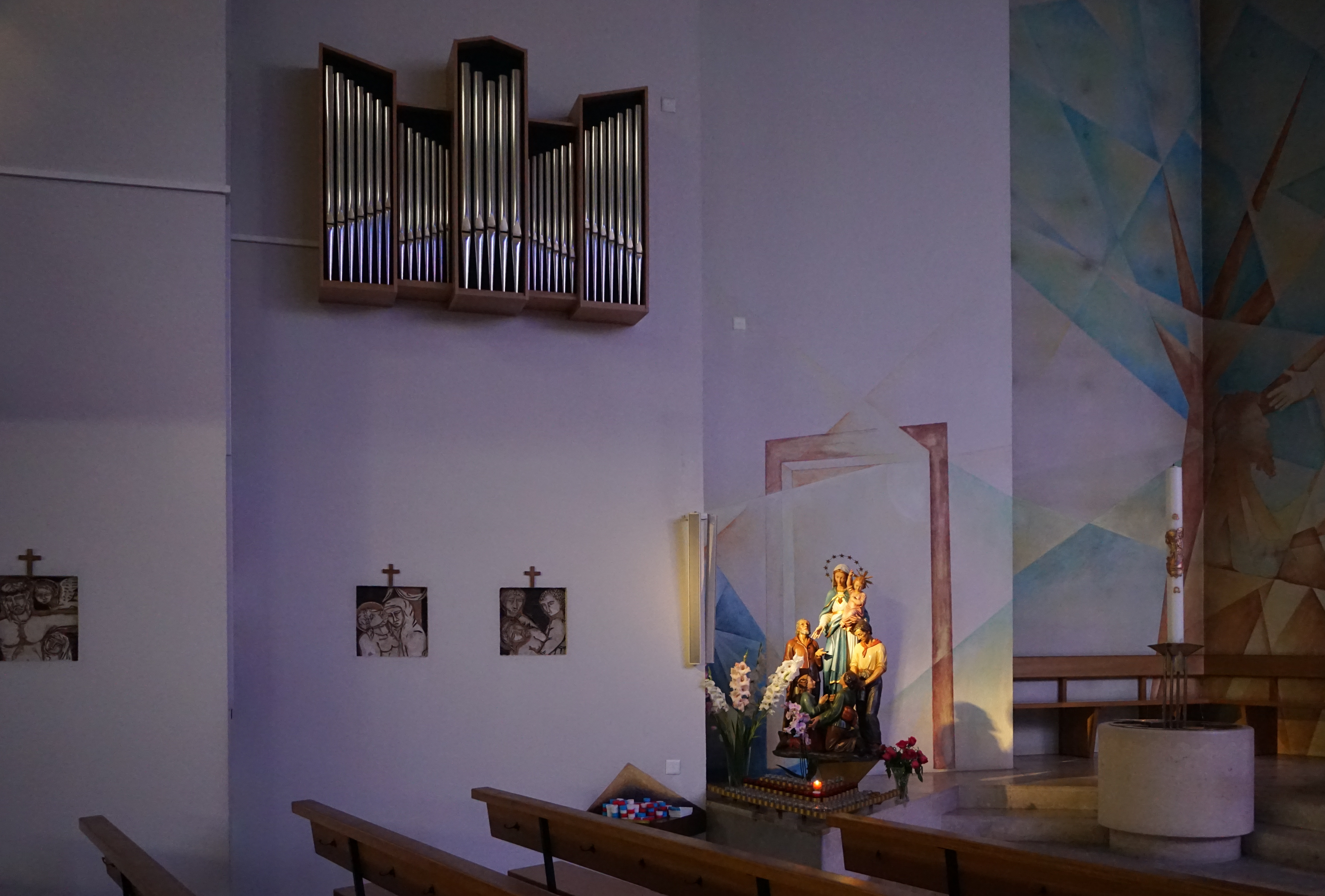 Die Kirche Madonna der italienischen Emigranten in Bern. Erbaut 1963 Innenraum mit Schwalbennestorgel.